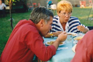 Horn Gyula és Szegvári Katalin vacsoráznak - Szárszói Találkozó 1993